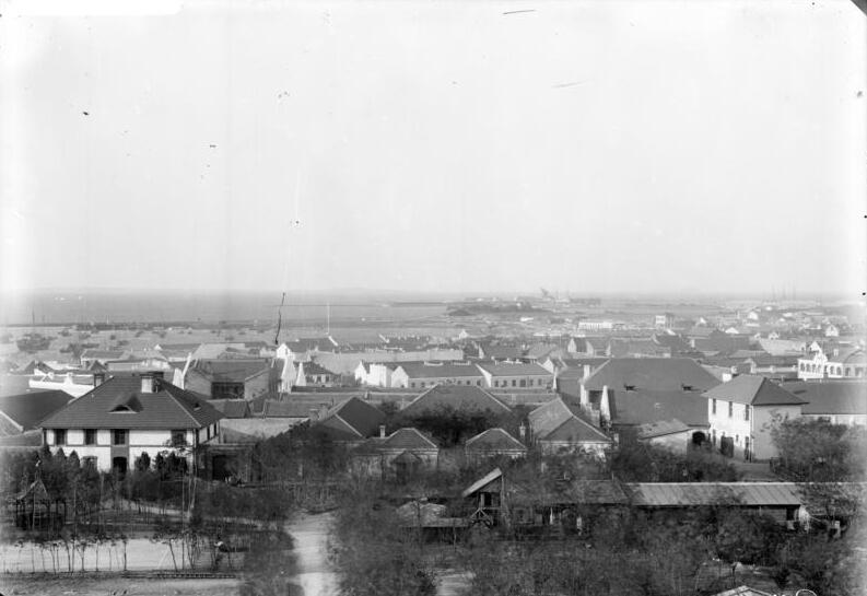 Schutzgebiet Kiautschou Tsingtau 1913 :Blick auf die Werft